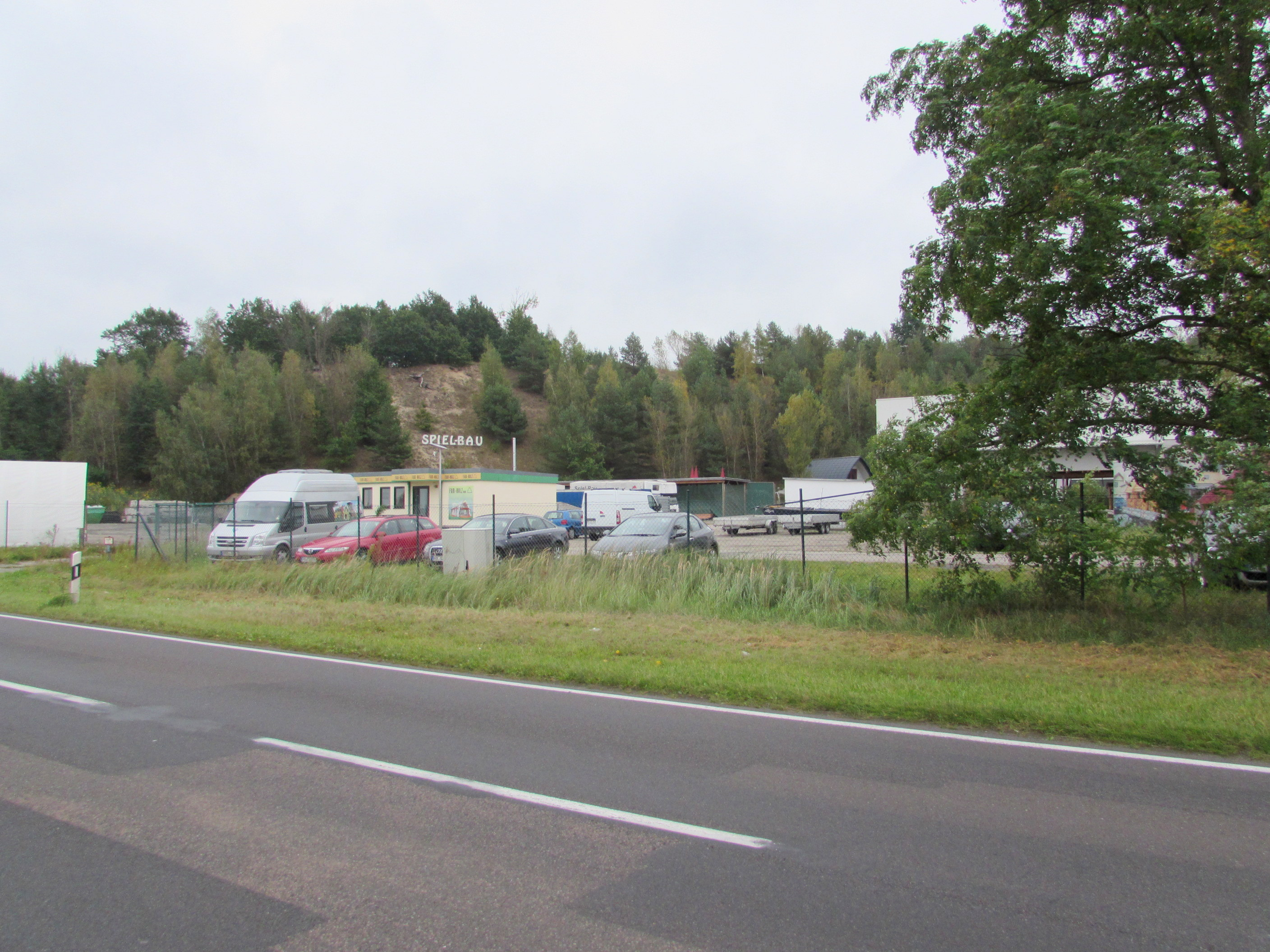 ehemaliger kiesabbau weinberg klein kreutz